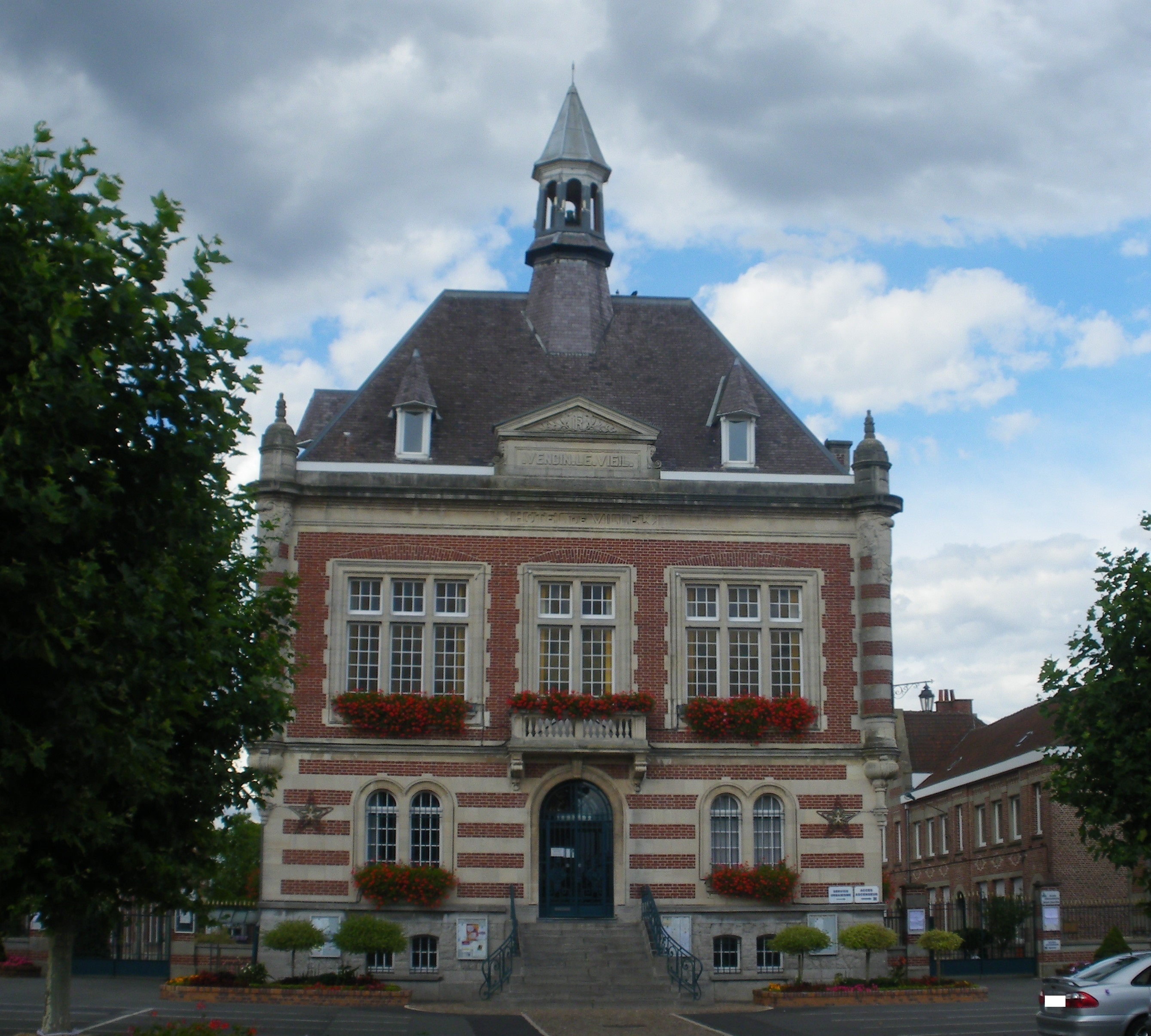 Vue de l'hôtel de ville de Vendin-le-Vieil.